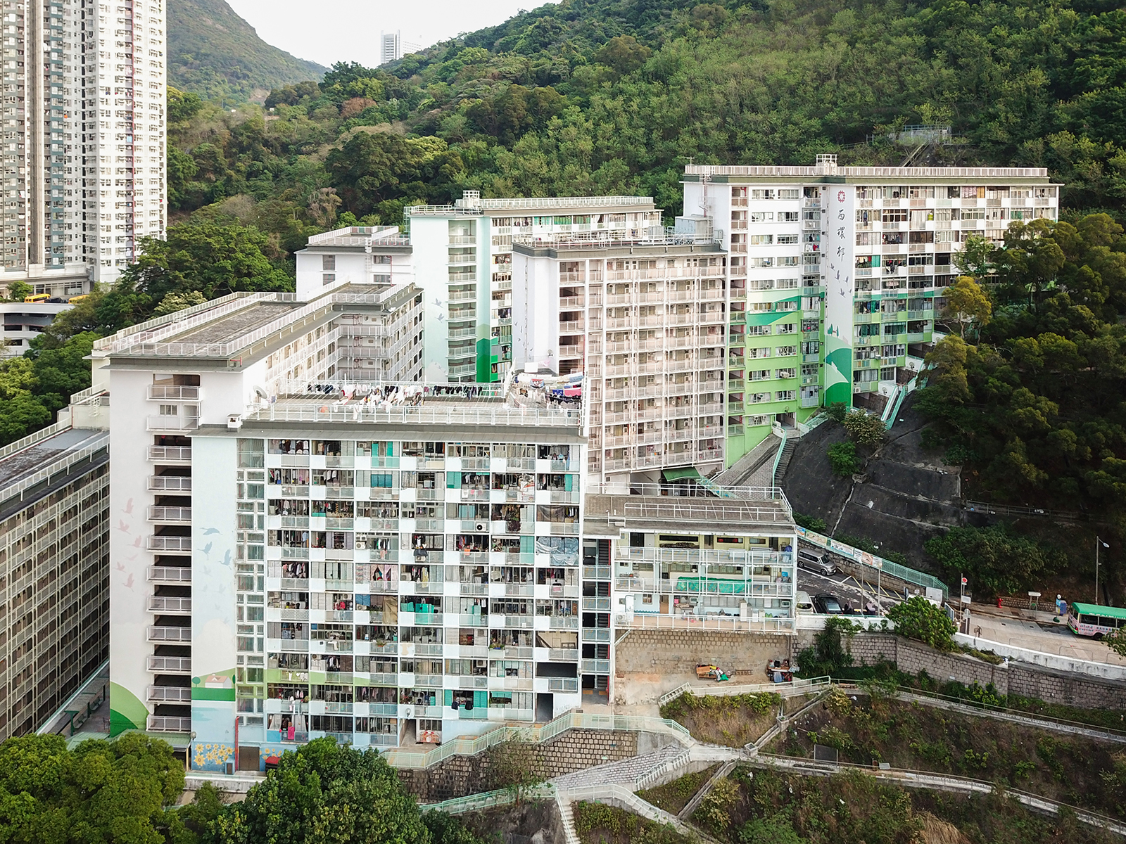 Sai Wan Estate